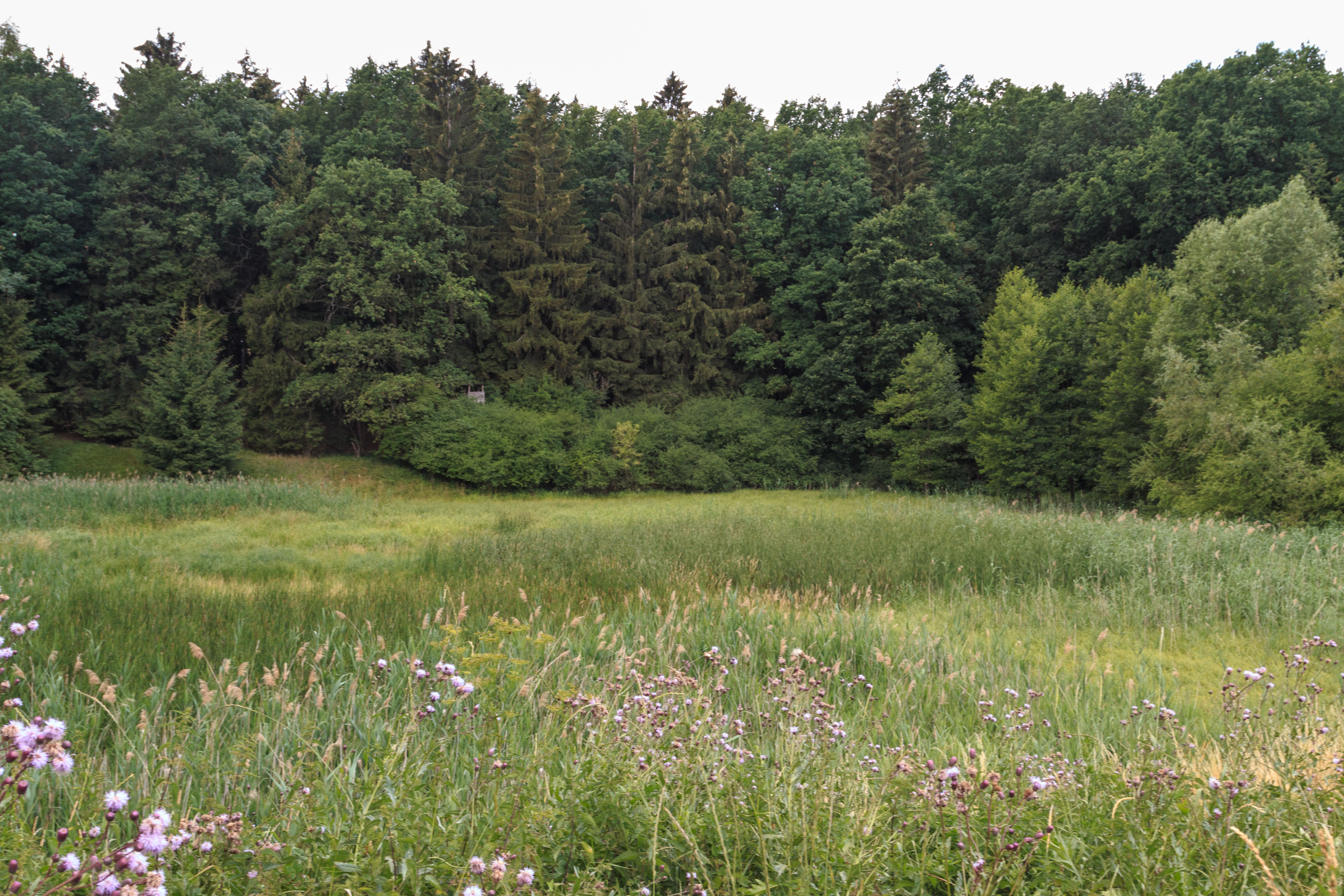 PP Červená Třemešná - rybník Project: Chráněná území.